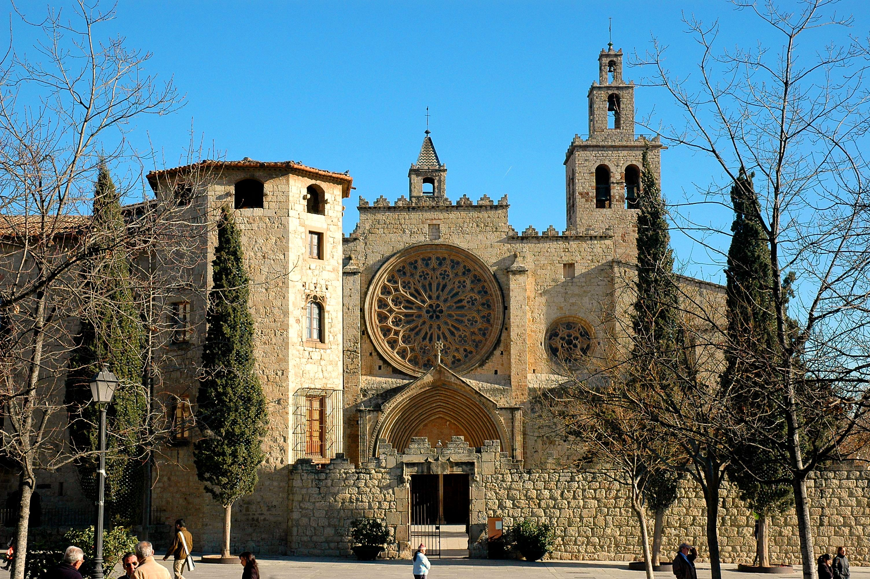 Monestir de Sant Cugat - Vista general